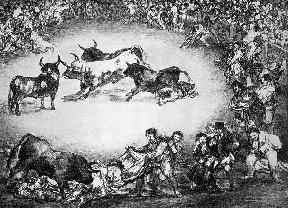 «Diversión de España» Litografía perteneciente a "Los toros de Burdeos"